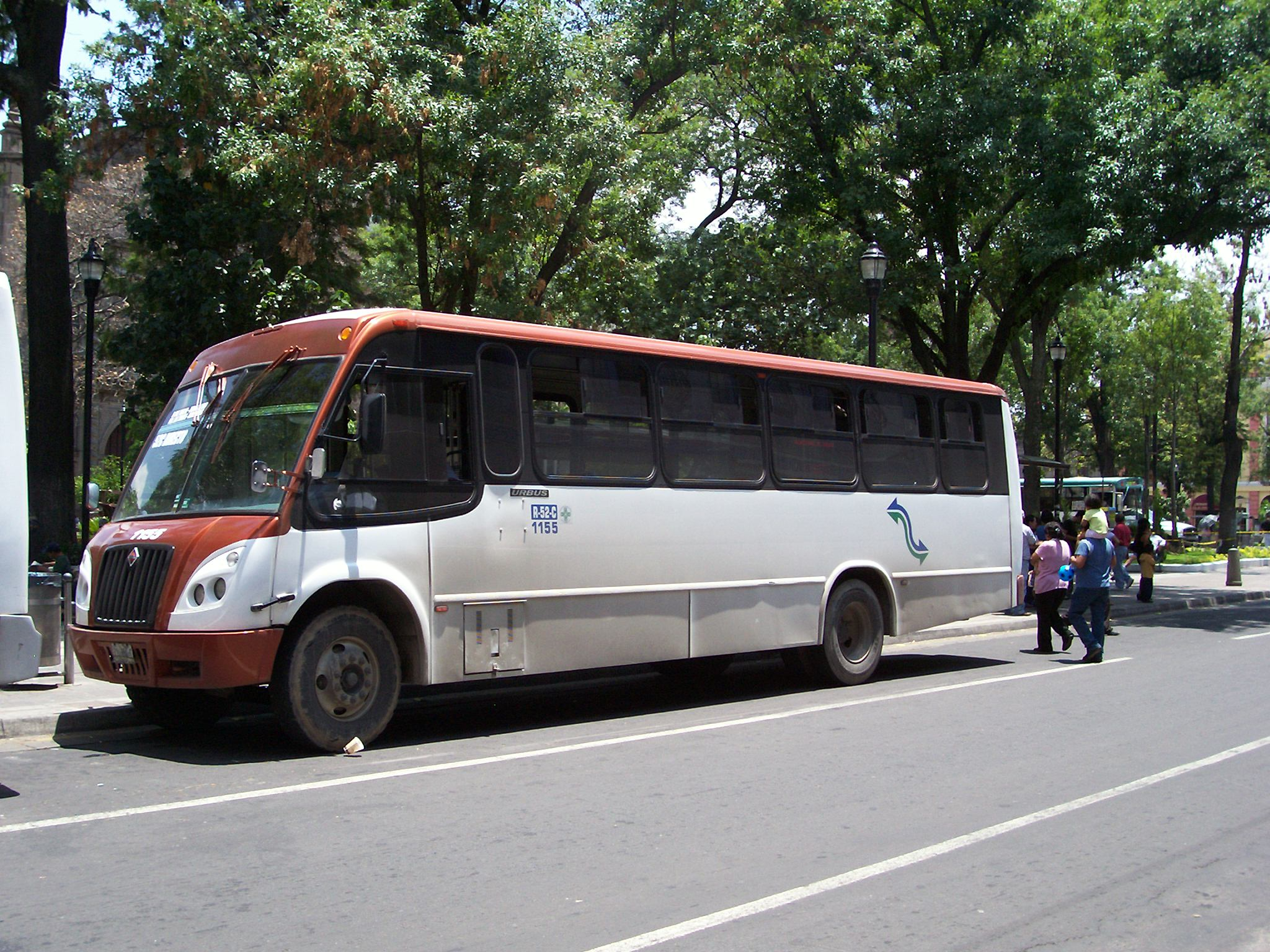 Autobus de la empresa de Transporte guadalajara, Transportes Vanguardistas de Guadalajara A.C.